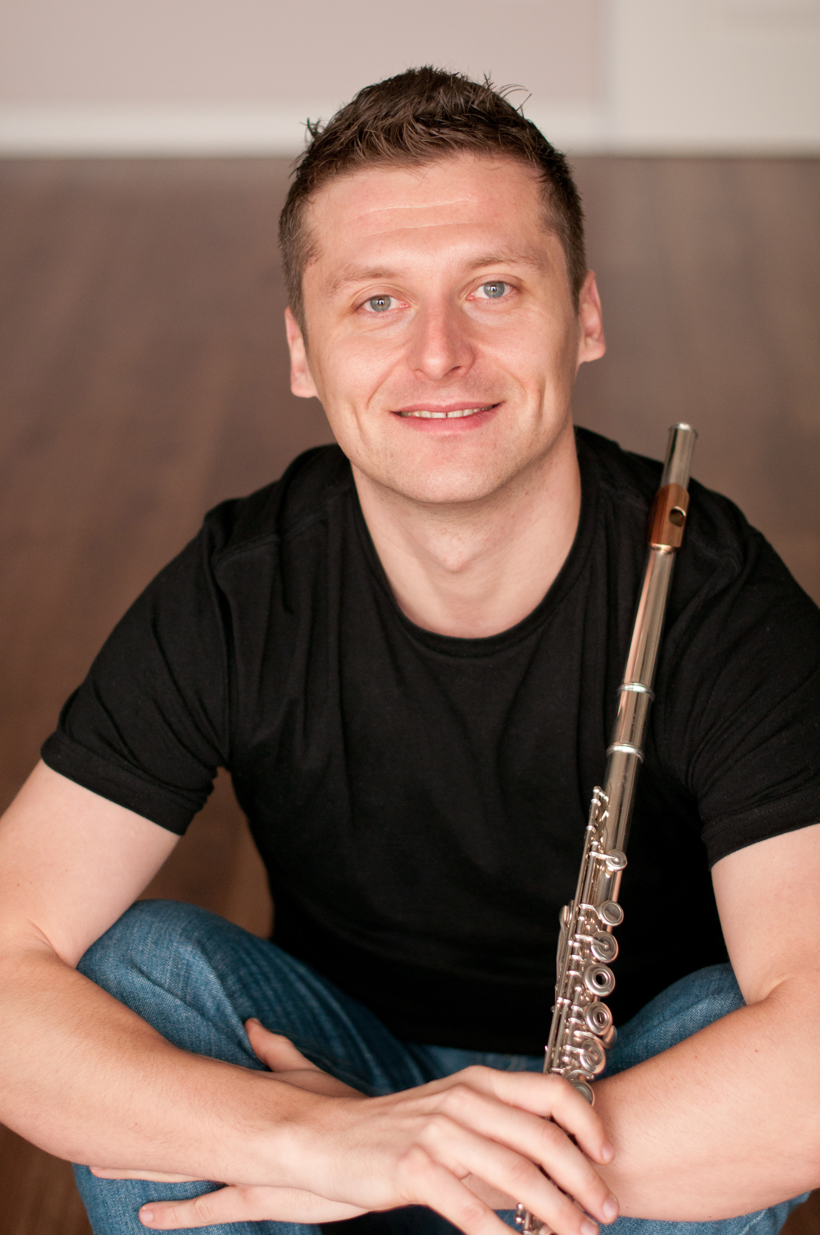 Foto_Krzysztof_Kaczka_01_Shooting_Januar_2012